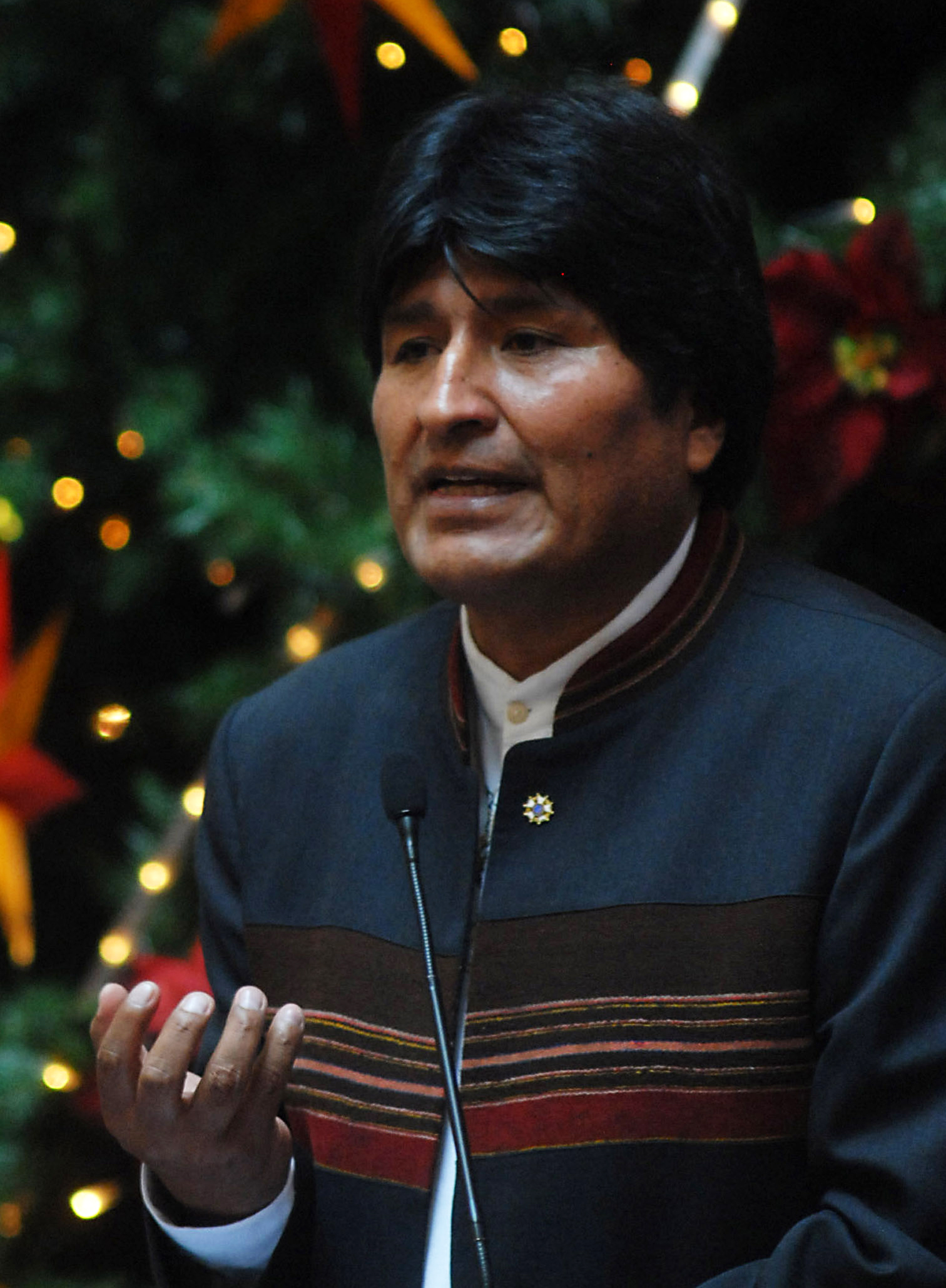 Presidente da Bolívia, Evo Morales, durante cerimônia de assinatura de atos.